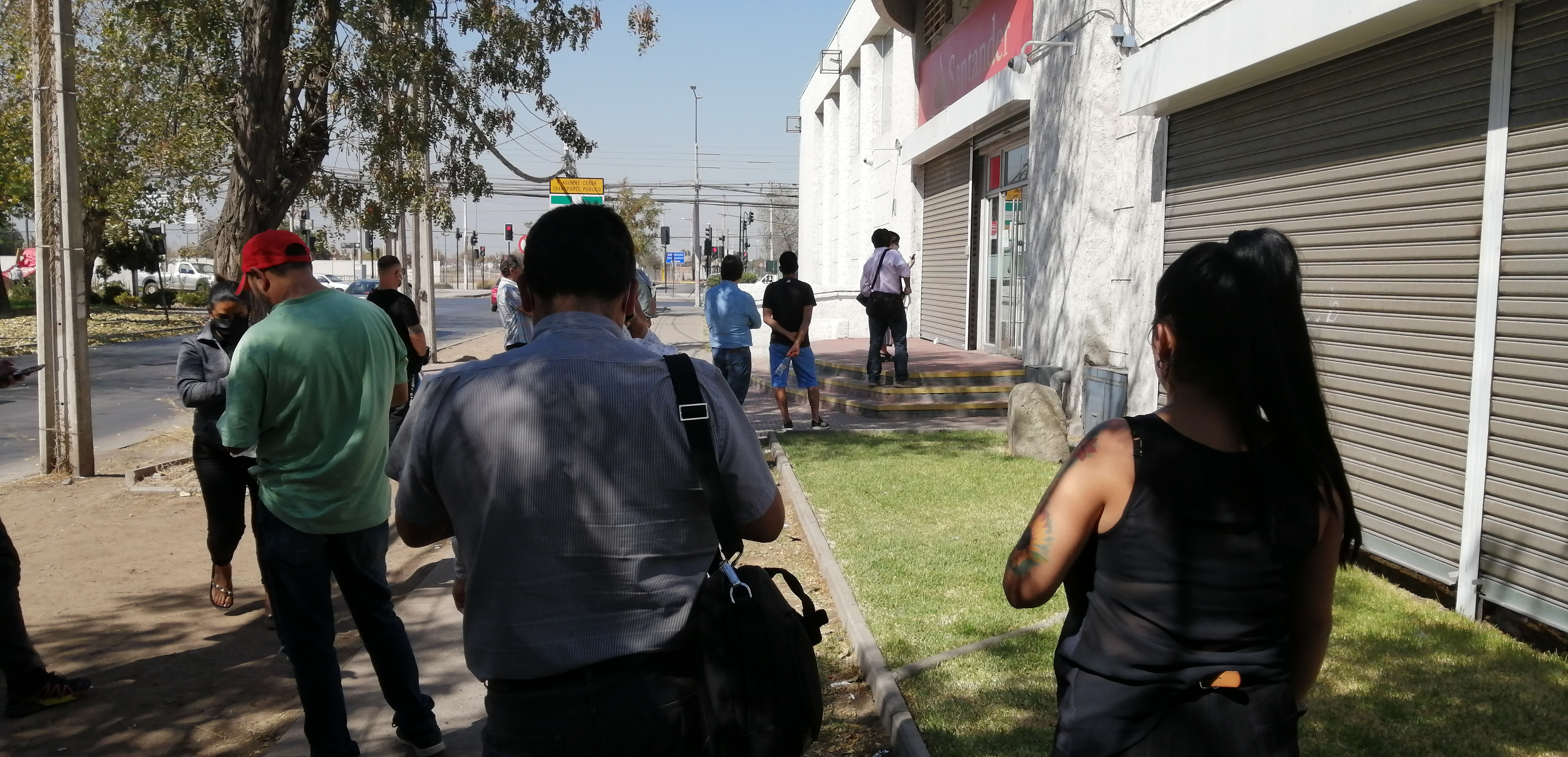 Con el estado de emergencia sanitaria en Chile a causa del virus COVID-19, ya para inicios de abril empresas habían tomado medidas sanitarias limitando el ingreso de usuarios a sus sucursales. En este caso se muestra una fila de personas esperando ingresar a una sucursal bancaria ubicada en la comuna de Cerrillos.